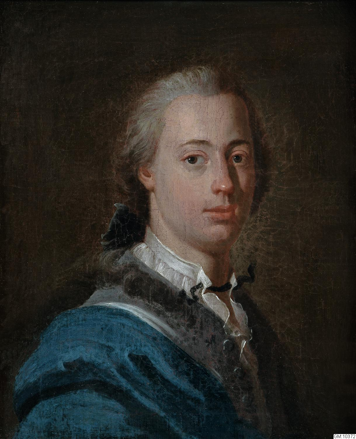 Johan Ross den äldre (1695–1773).